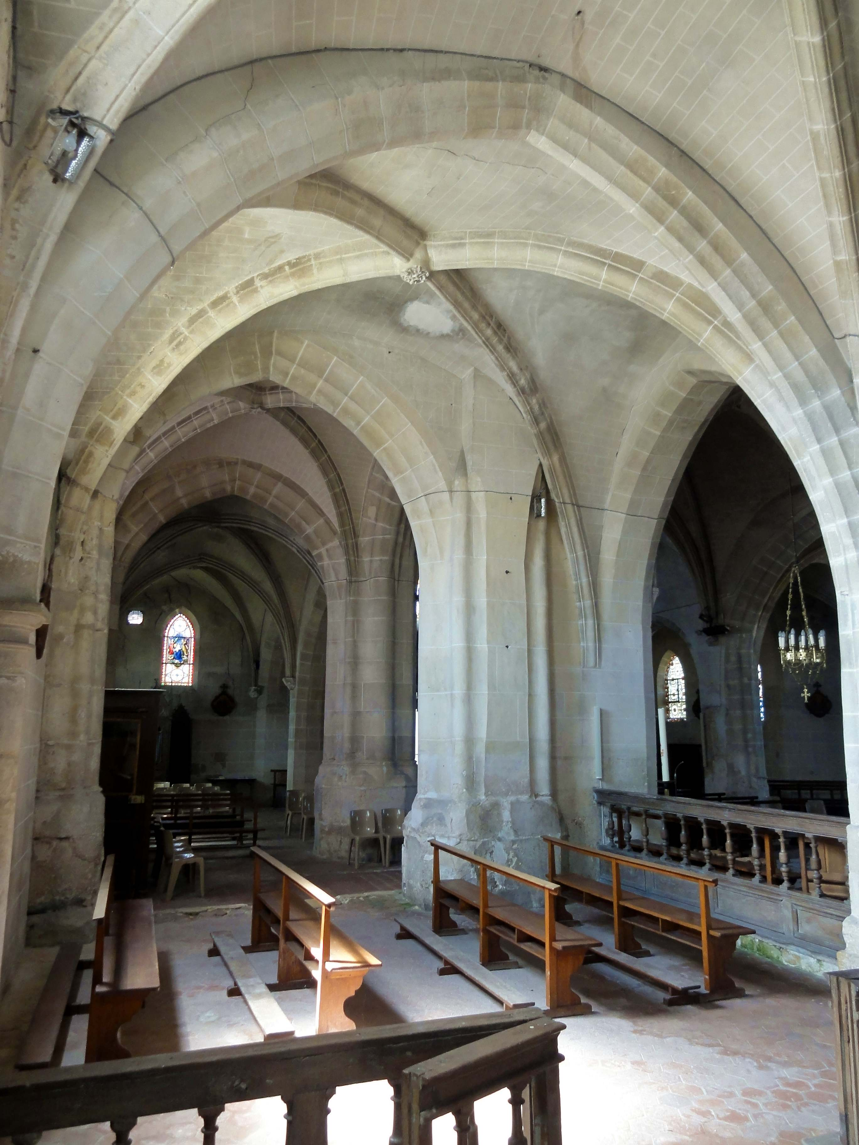 Intérieur de l'église (voir titre).